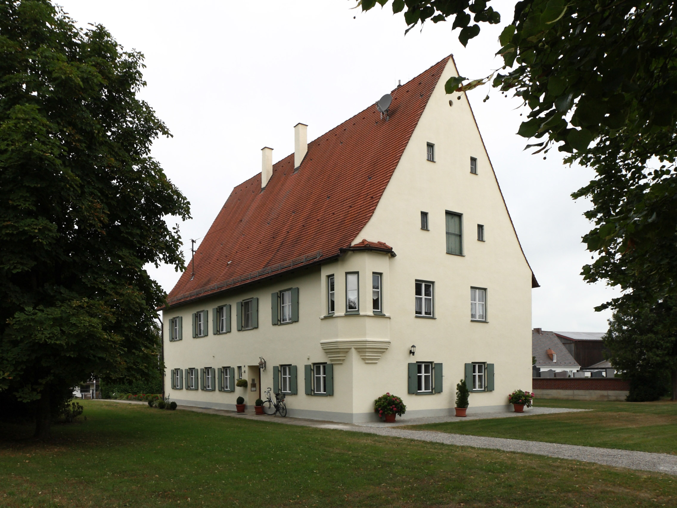 Ansicht von Südosten